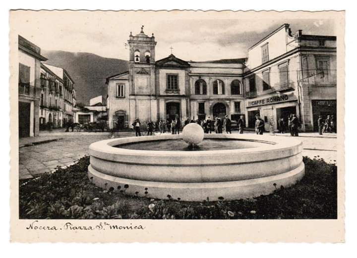 Cartolina di piazza Santa Monica in Nocera Inferiore, ai primi del '900